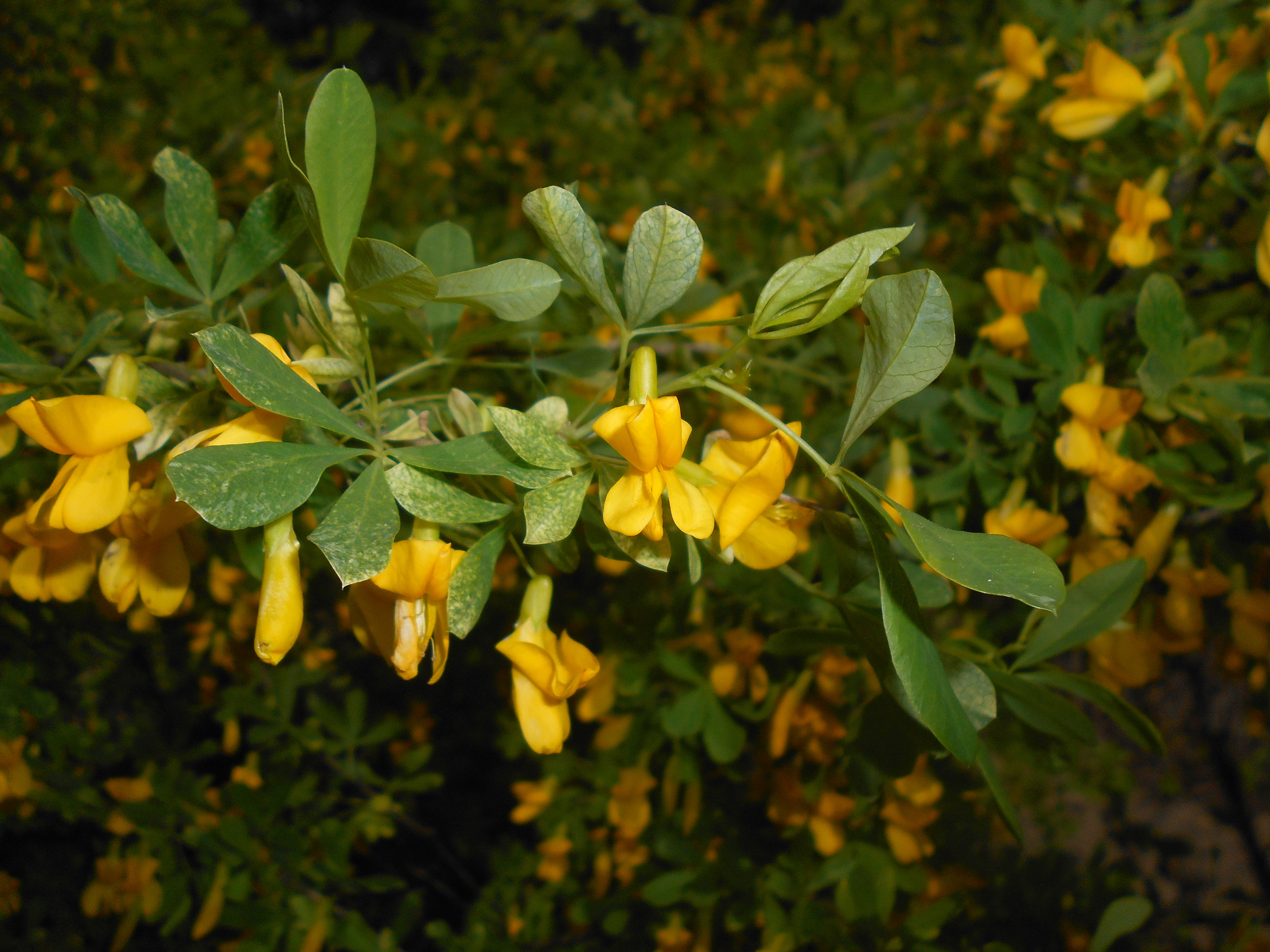 Karagana podolska (Caragana frutex), Ogród Botaniczny UMCS w Lublinie